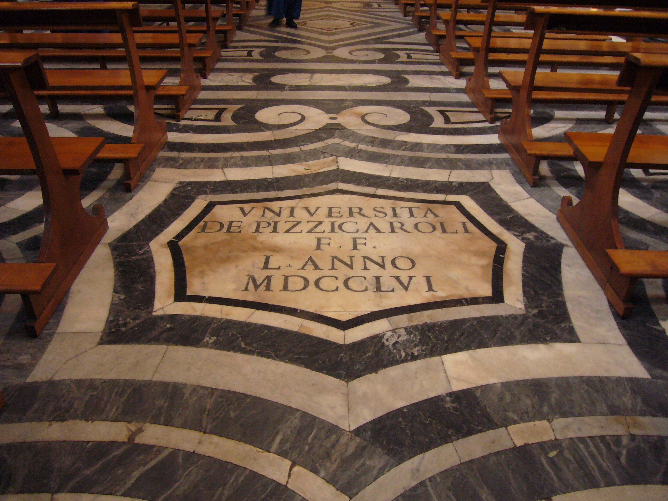 Roma, Santa Maria dell'Orto a Trastevere: Universita dei Pizzicaroli (1756)